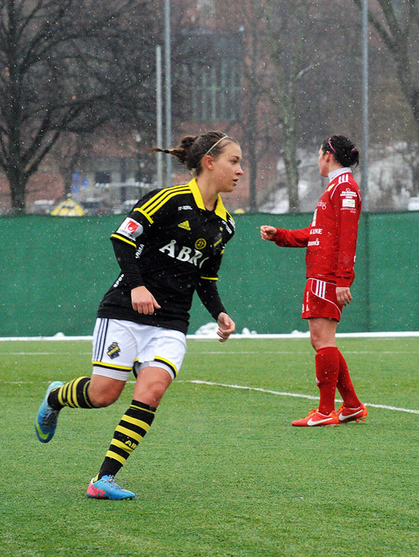 a_62_9685